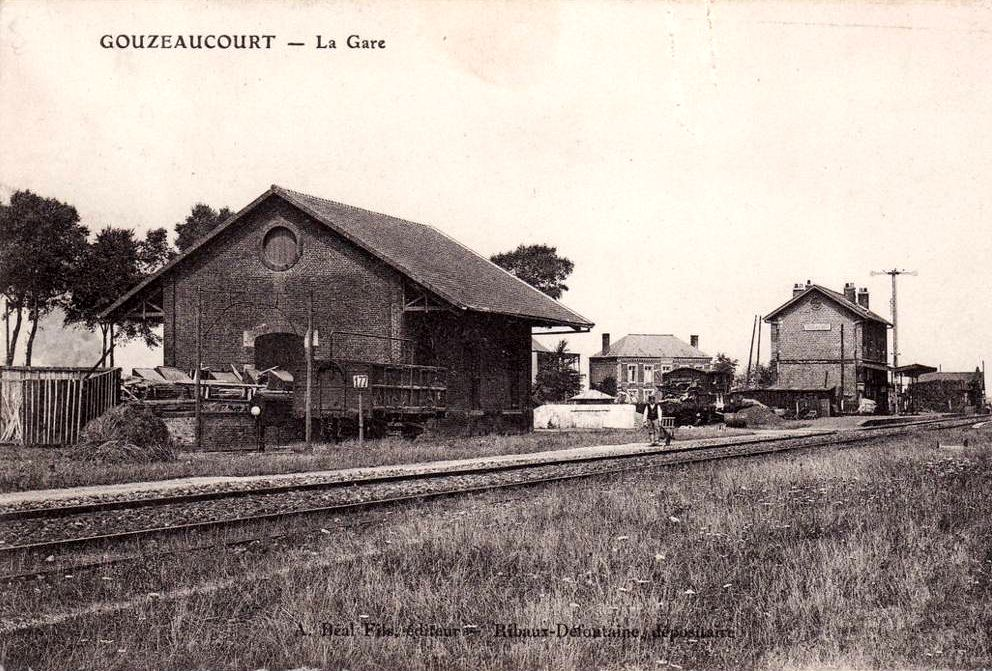 La gare de Gouzeaucourt ; au premier plan, la halle à marchandises.